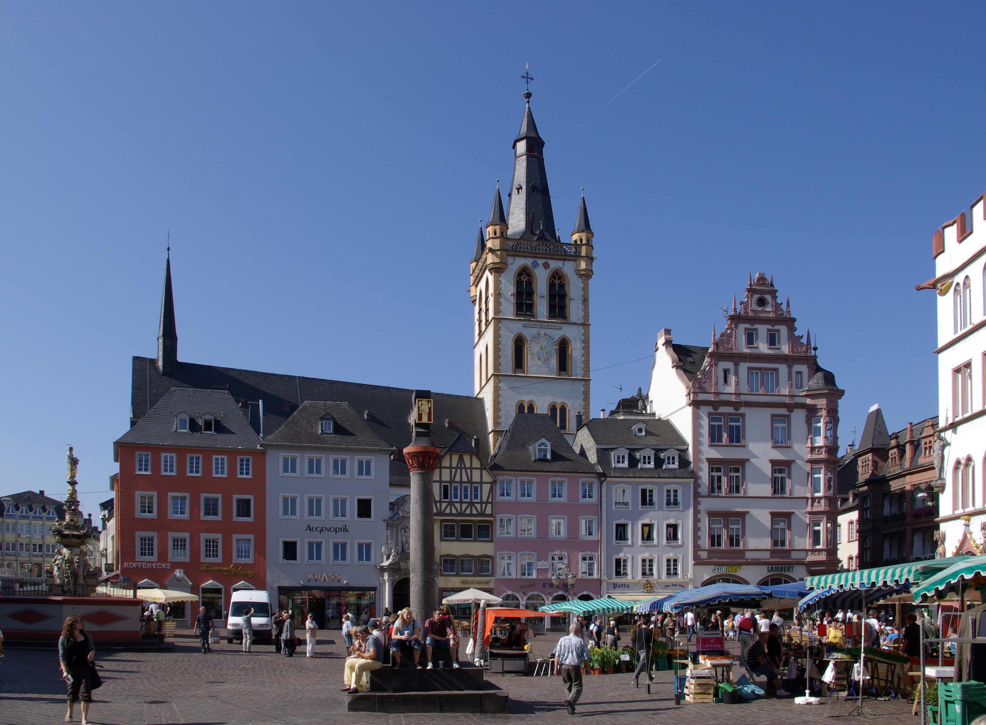 Trier, Hauptmarkt mit St. Gangolf